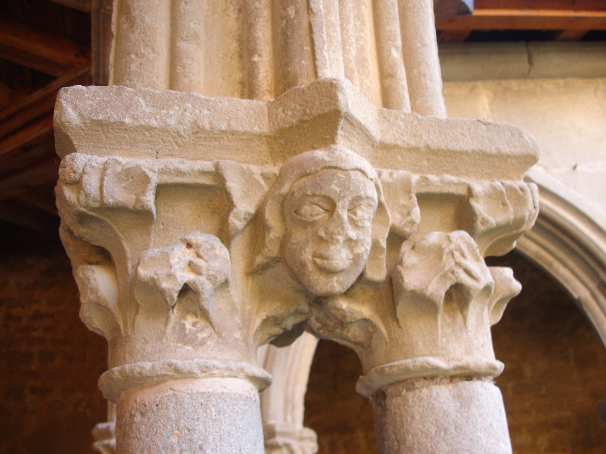 Abbaye de Saint-Hilaire, Aude (11), chapiteau du cloître